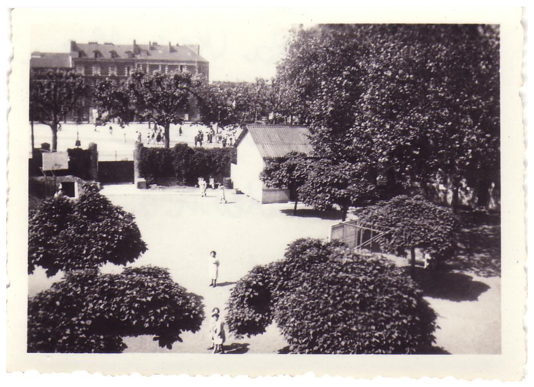 Vue sur la place de la République, depuis la cour de l'école primaire supérieure de jeunes filles, place de la République. A doite du portail, le bâtiment serait la salle de musique ; à gauche, on aperçoit l'entrée des tranchées de défense anti-aérienne. Verso : "salle de musique, ouverture des tranchées, juin 1941"